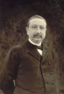 French politician Maurice Berteaux (1852-1911)